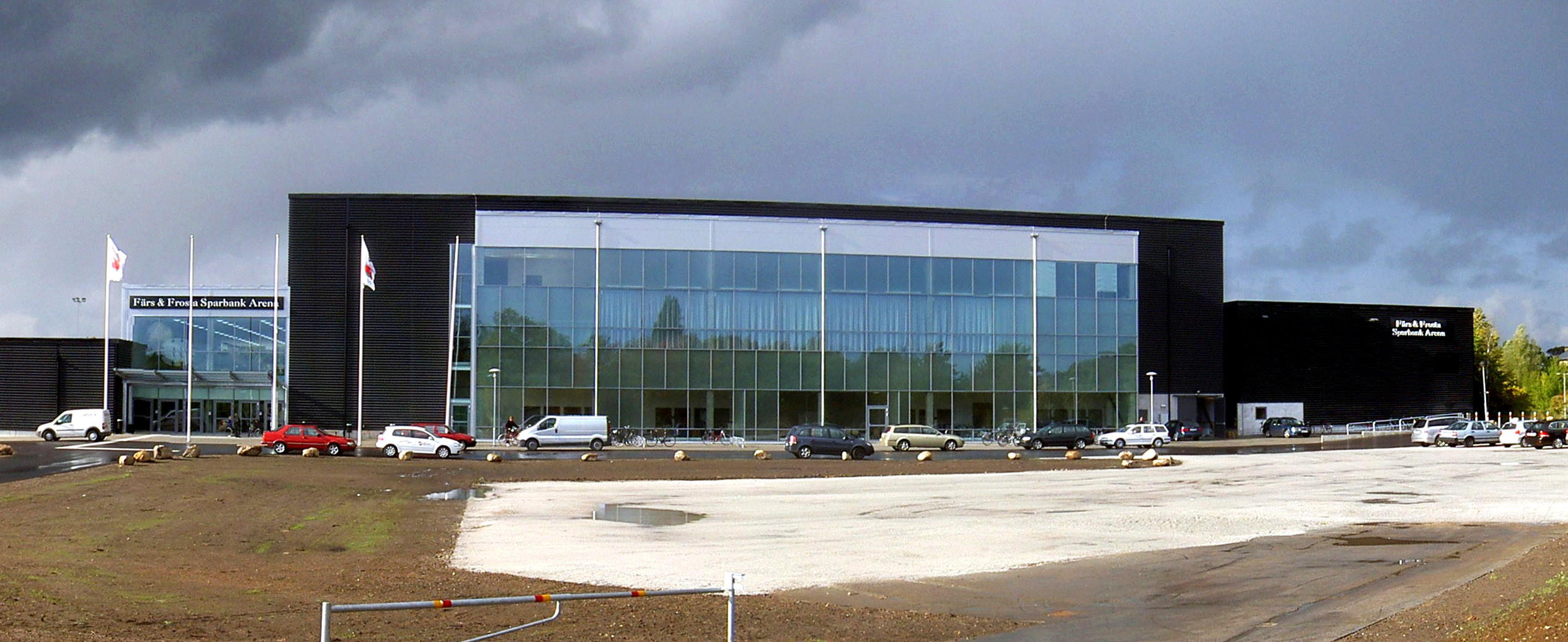 Färs & Frosta Sparbank Arena, Lund